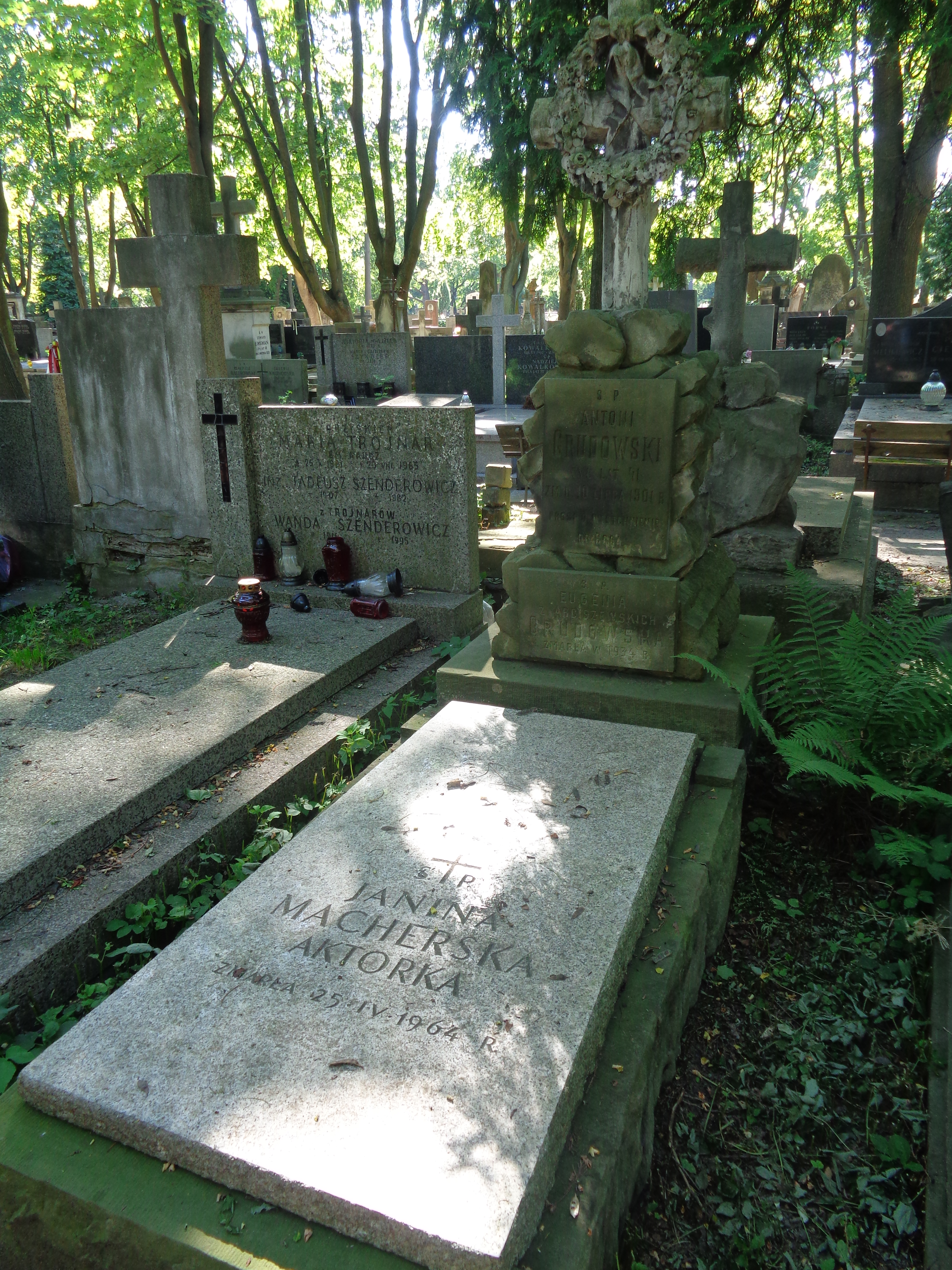 Grób Janiny Macherskiej na Cmentarzu Powązkowskim